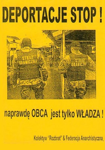 Zdjęcie ze strony skłotu Rozbrat. Za zgodą kolektywu.